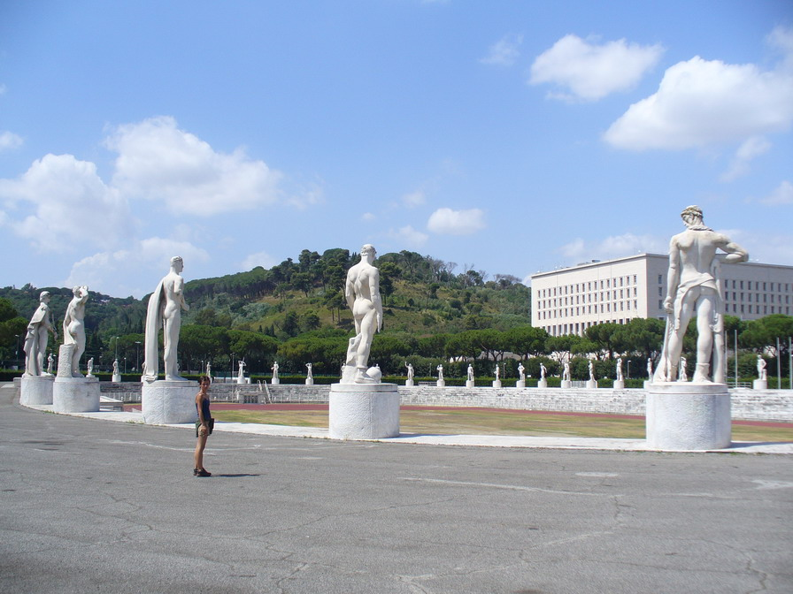 Roma - Stadio Olimpico - Stadio dei Marmi - Andrea